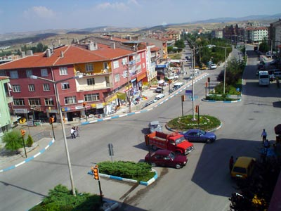 KAZAN VE KÖYLERİNDEKİ GAYRİMENKULLERINIZ DEGERİNDE ALINIR SATILIR:TAHA DEVLET:0507.927.00.11